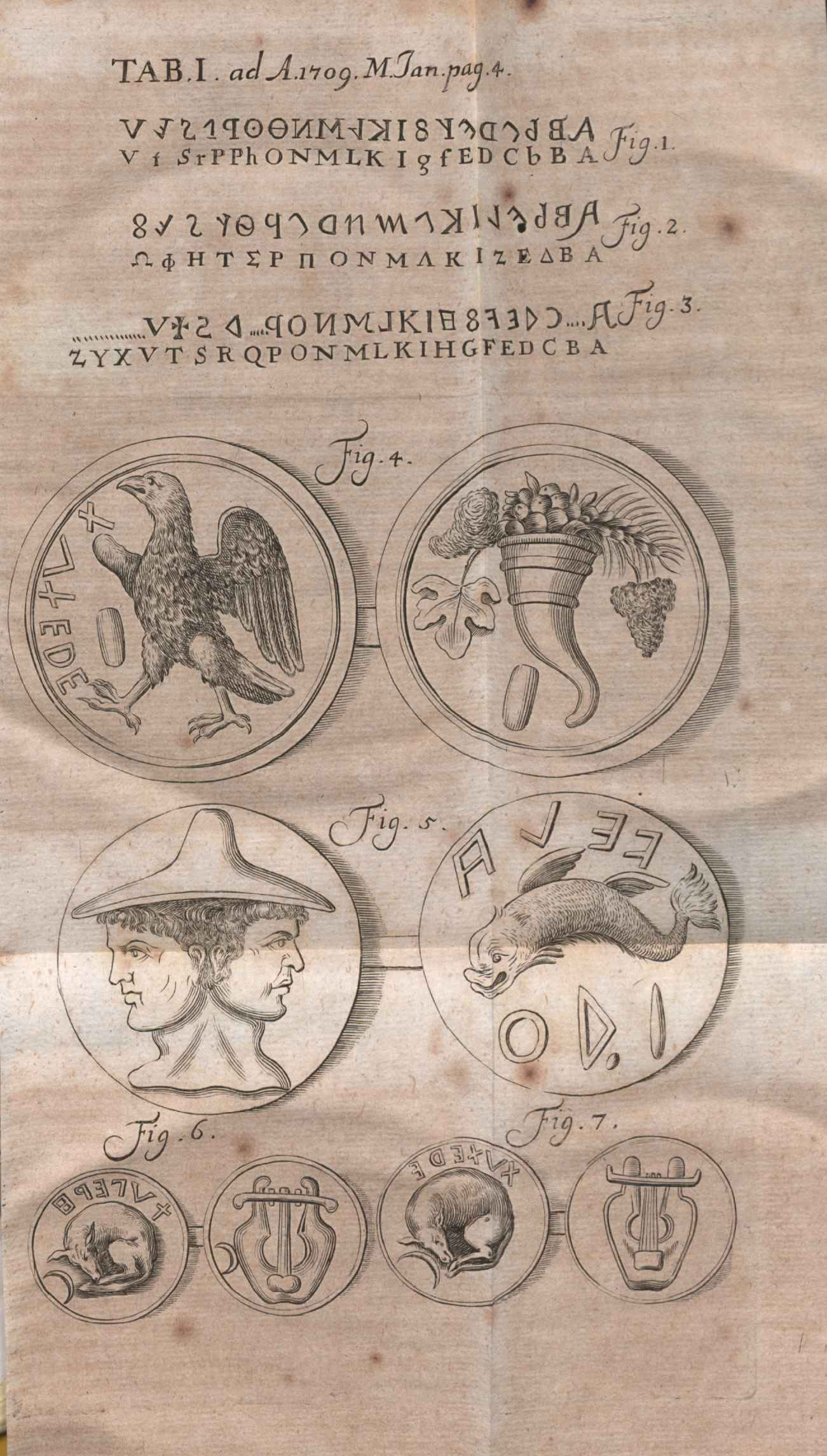 Illustration